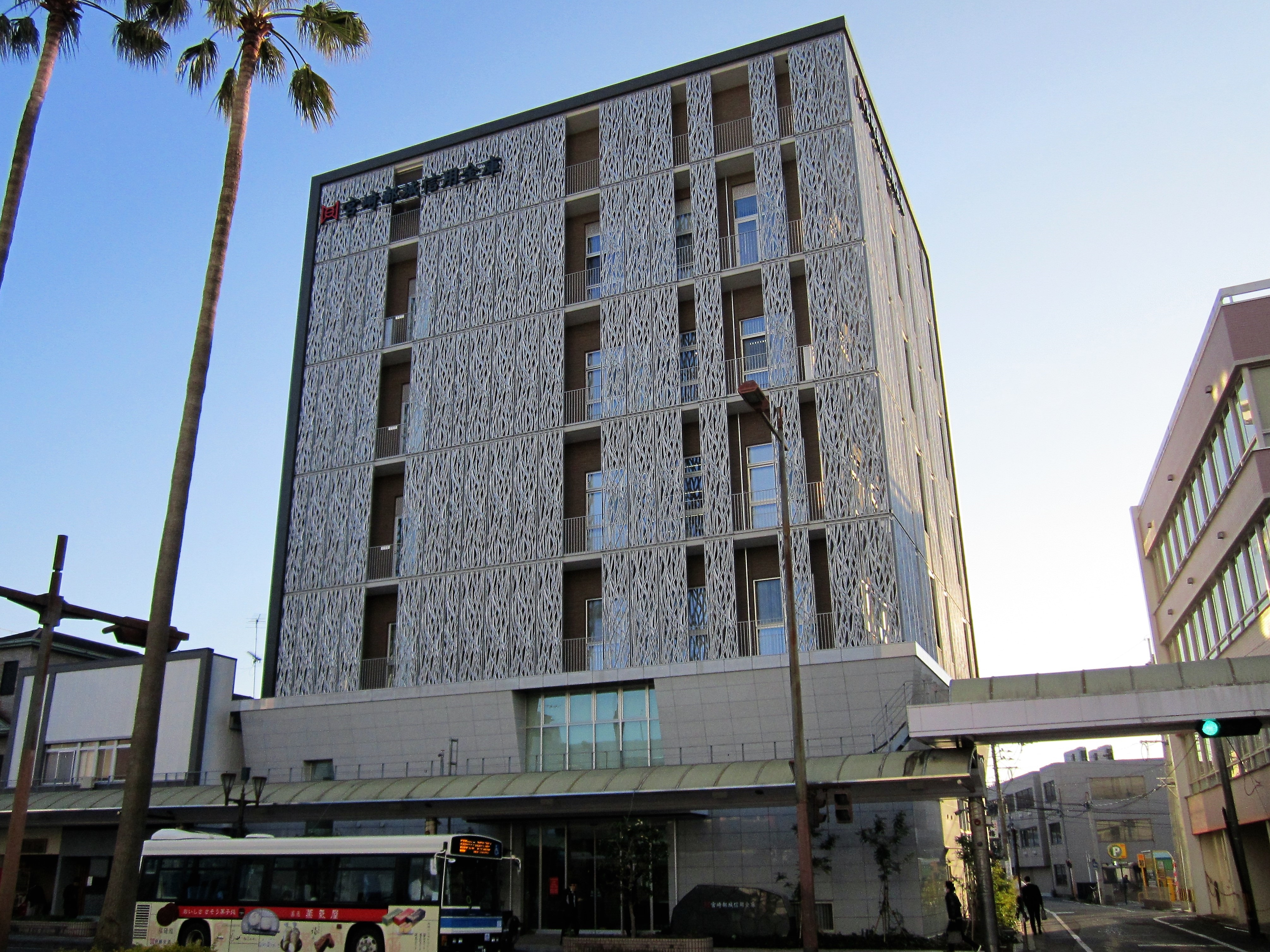 宮崎都城信用金庫 本店（宮崎市橘通東） Canon PowerShot A2200